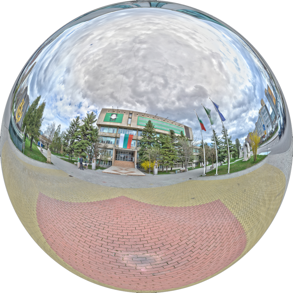 Малка планета